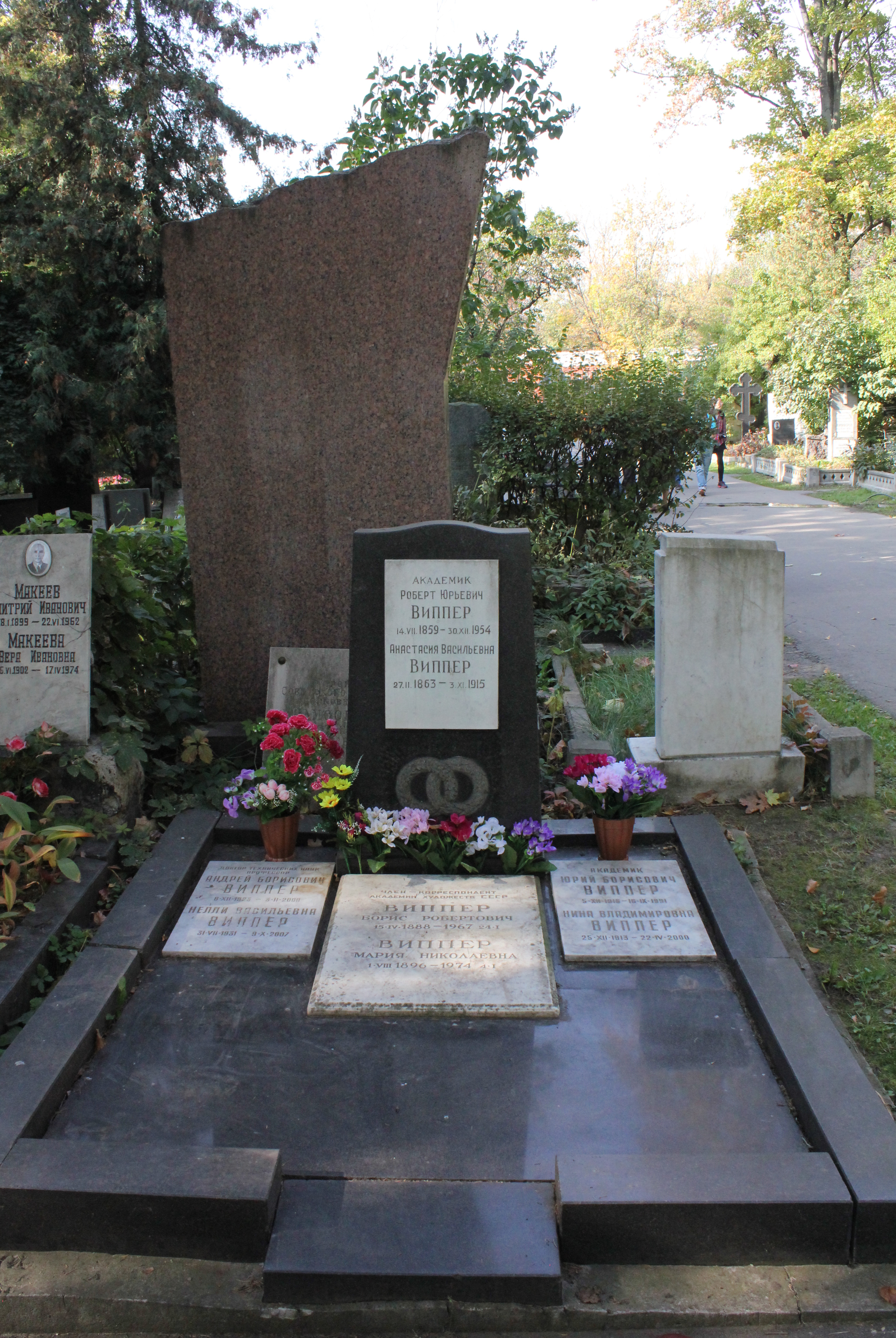 Могила Виппера Роберта Юрьевича (1859-1954): Новодевичье кладбище, Хамовники, Центральный округ, Москва